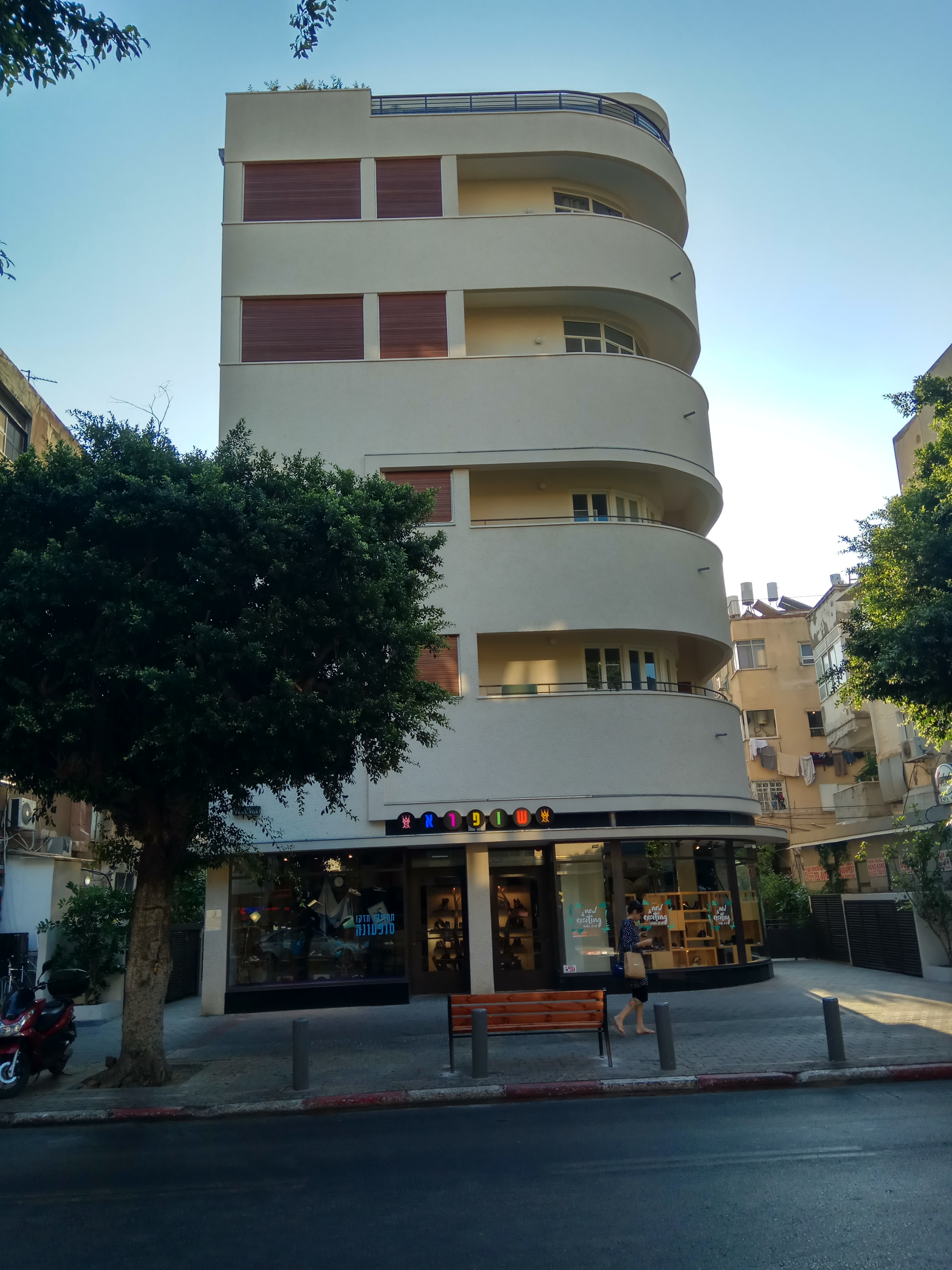 דיזנגוף 108, בניין באוהאוס שעבר שימור ב-2015.